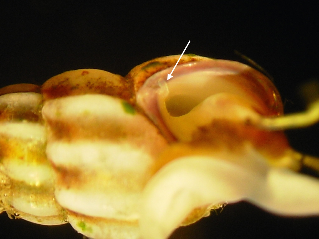 Rissoa guerini. Côté du corps et tentacule palléal (flèche).